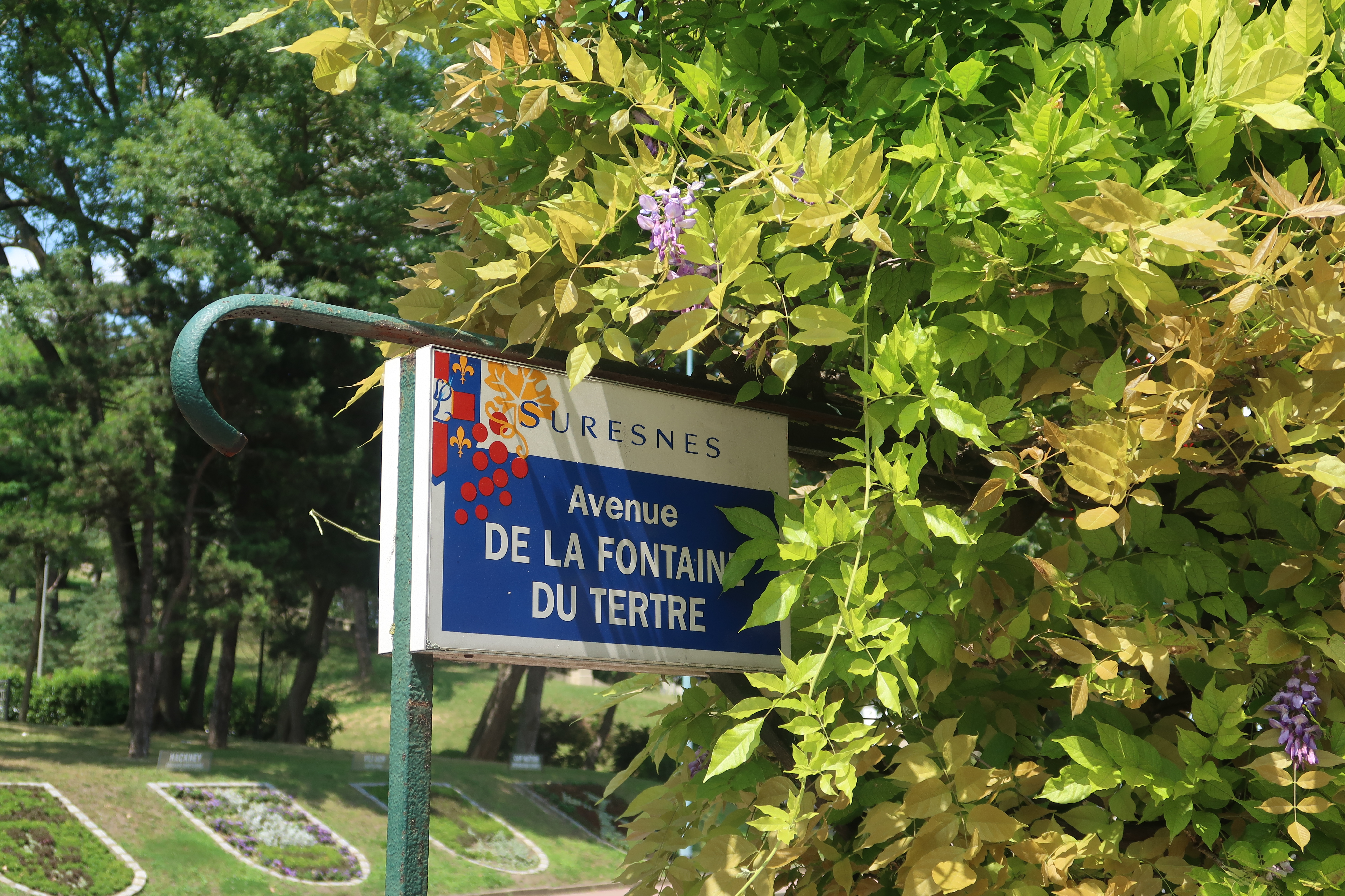 Plaque de l'avenue de la Fontaine-du-Tertre à Suresnes (Hauts-de-Seine).